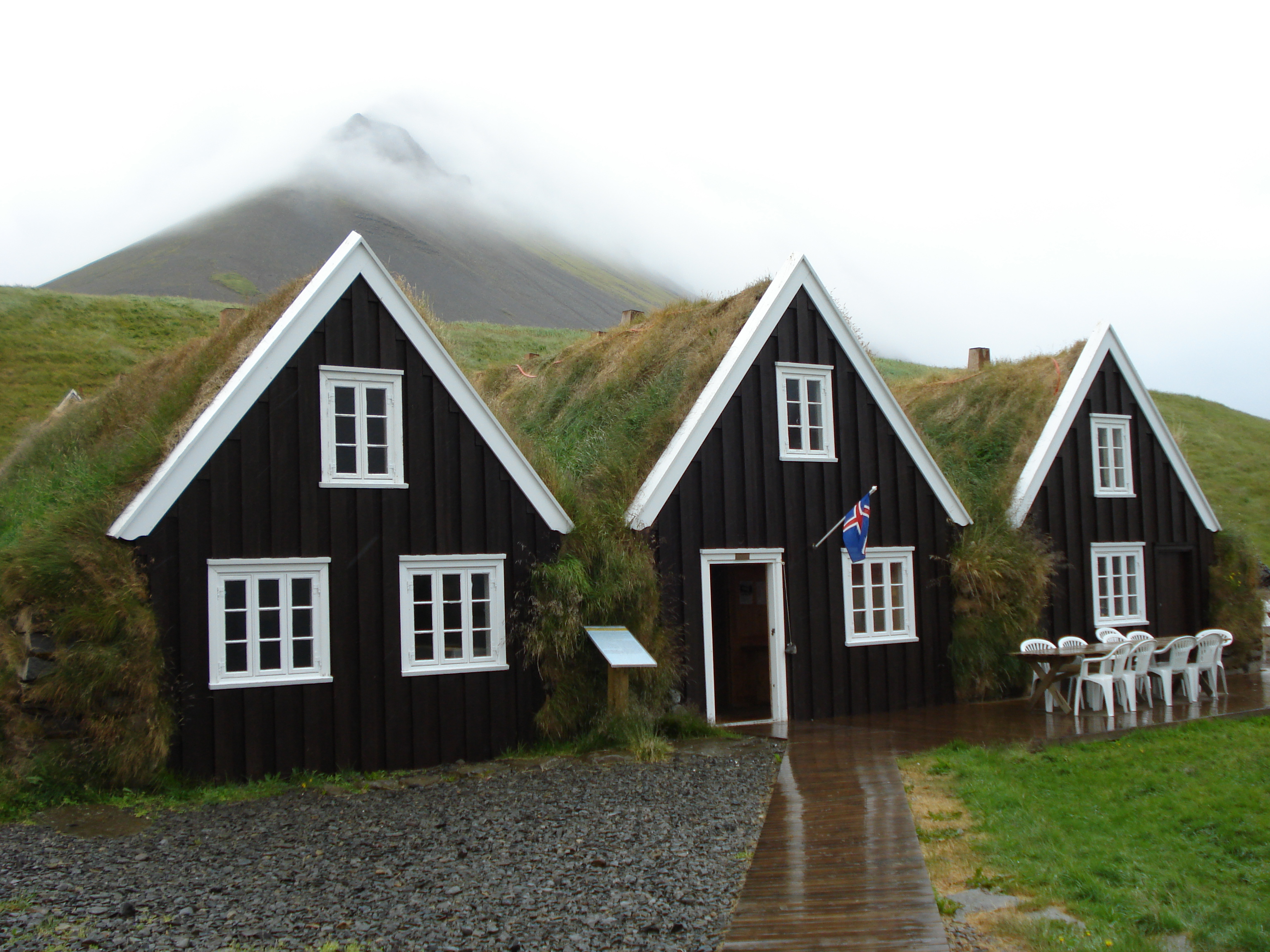 Hrafnseyri (Jón Sigurðsson), Iceland